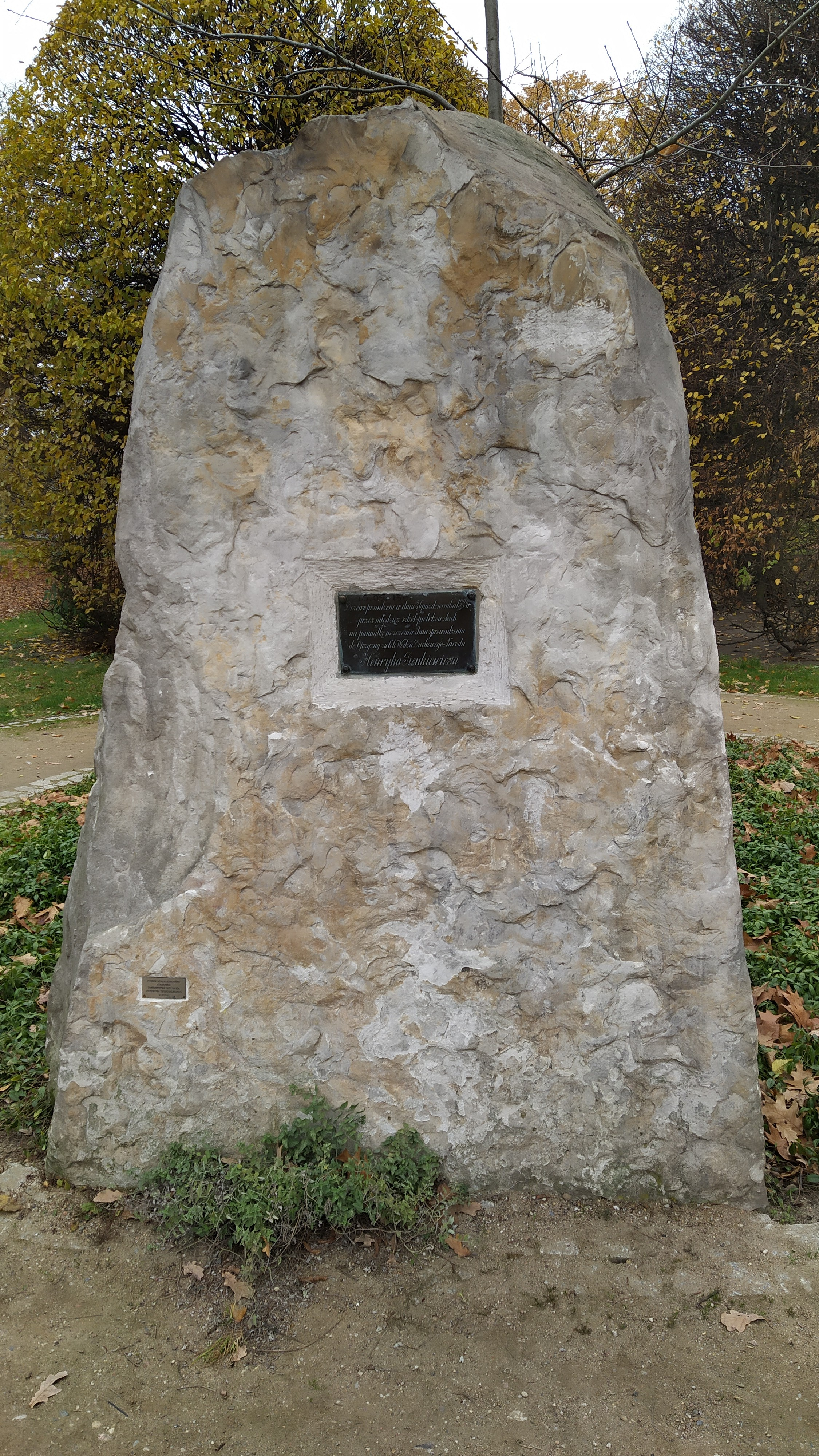 Piotrków Trybunalski park miejski - kamień pamiątkowy ku czci Henryka Sienkiewicza